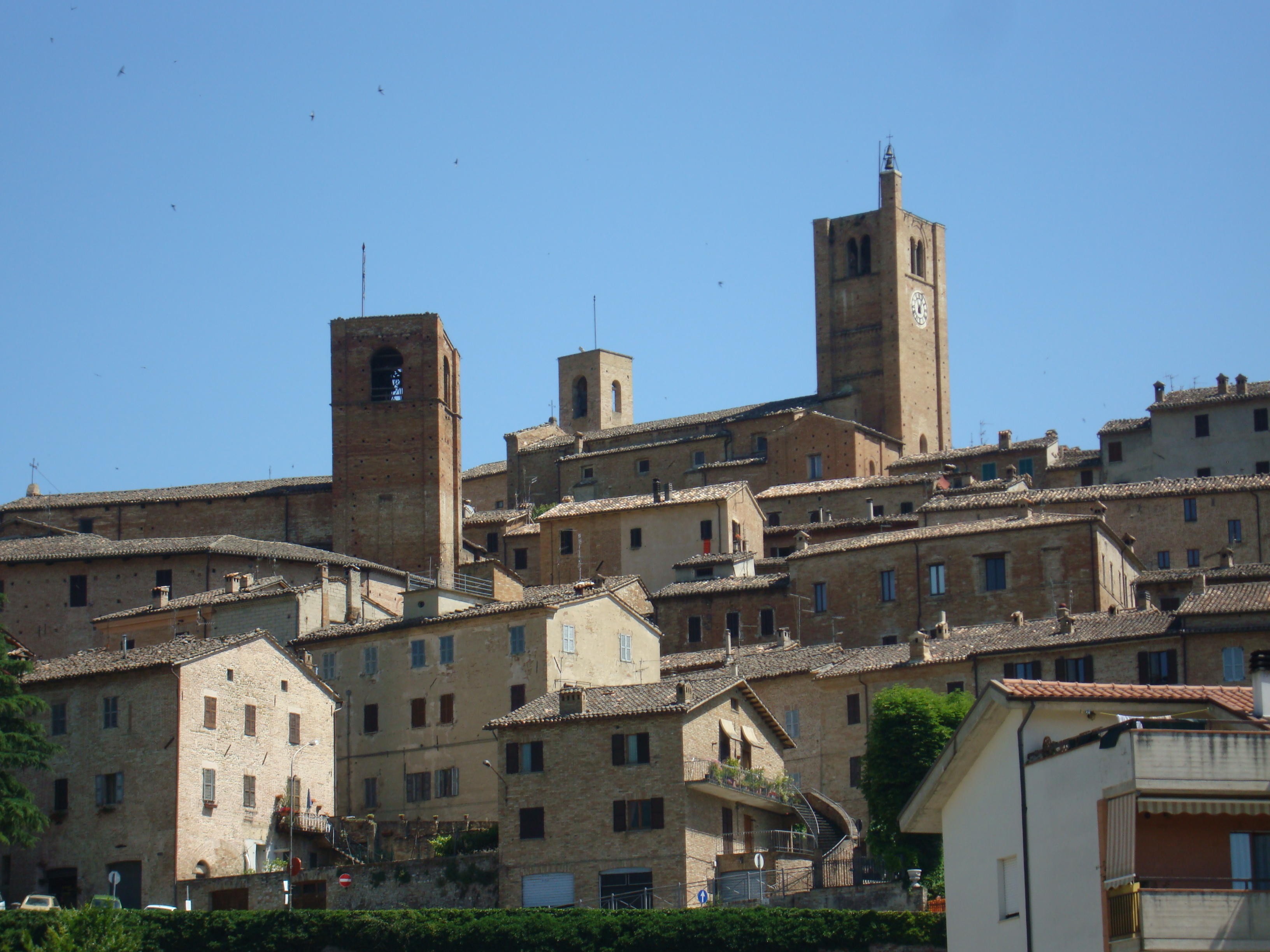 Sarnano - Le tre torri